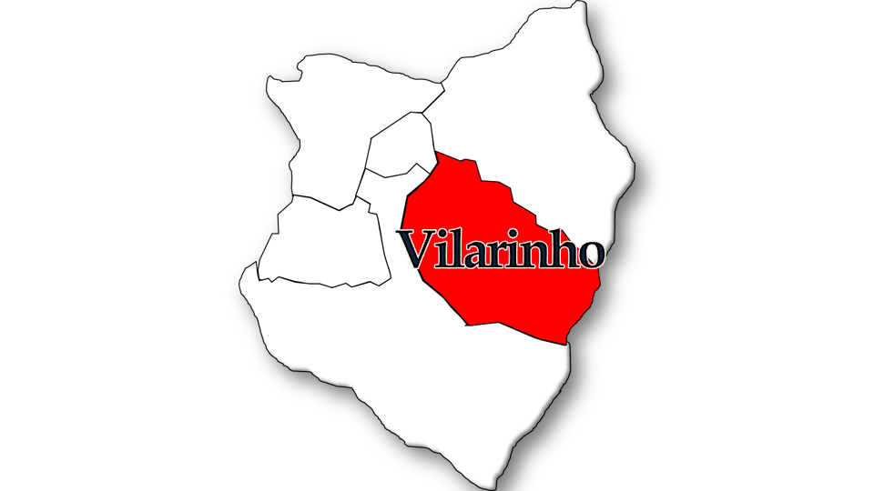 População